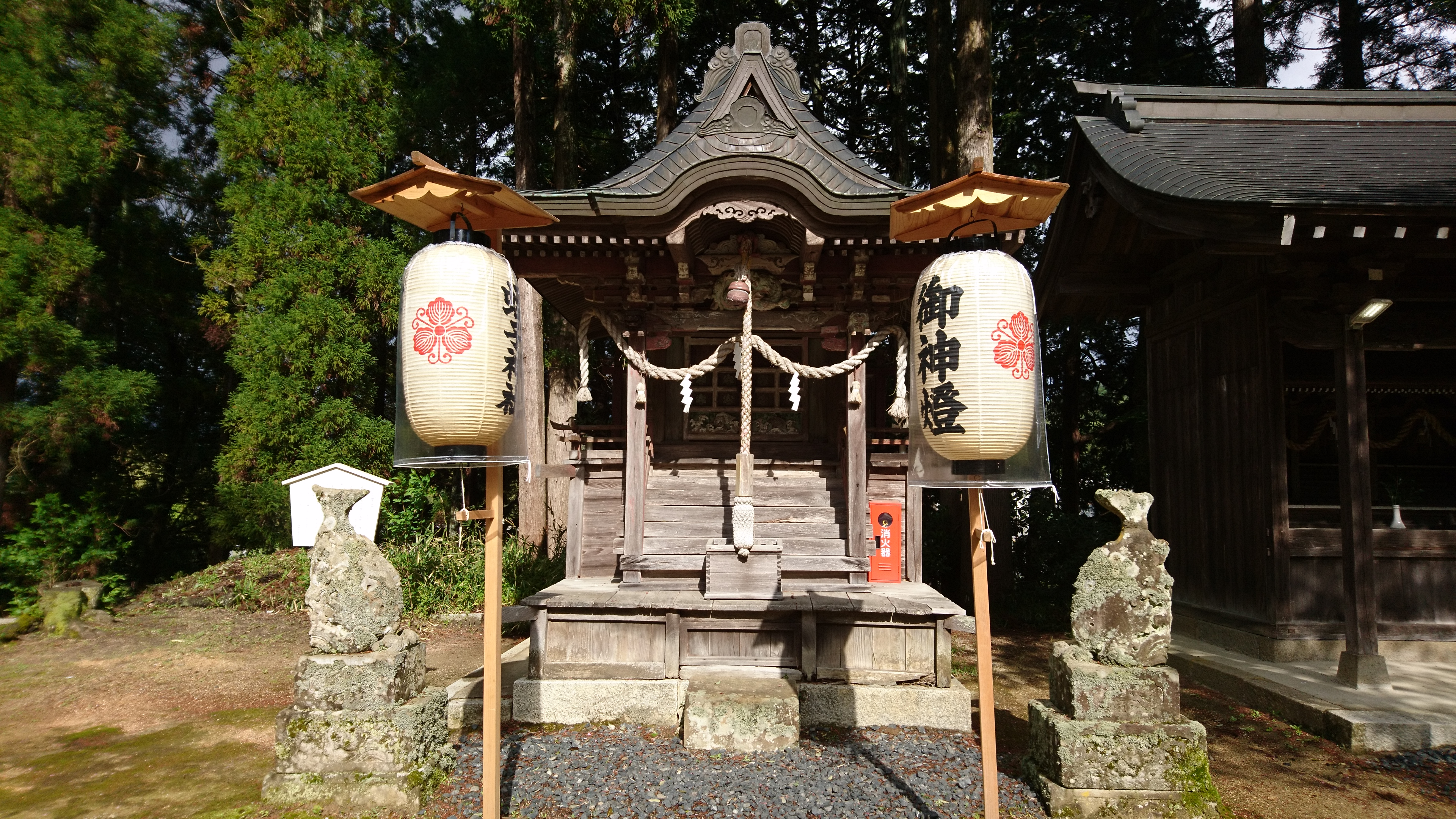 与謝野町 八幡神社 境内 式内社